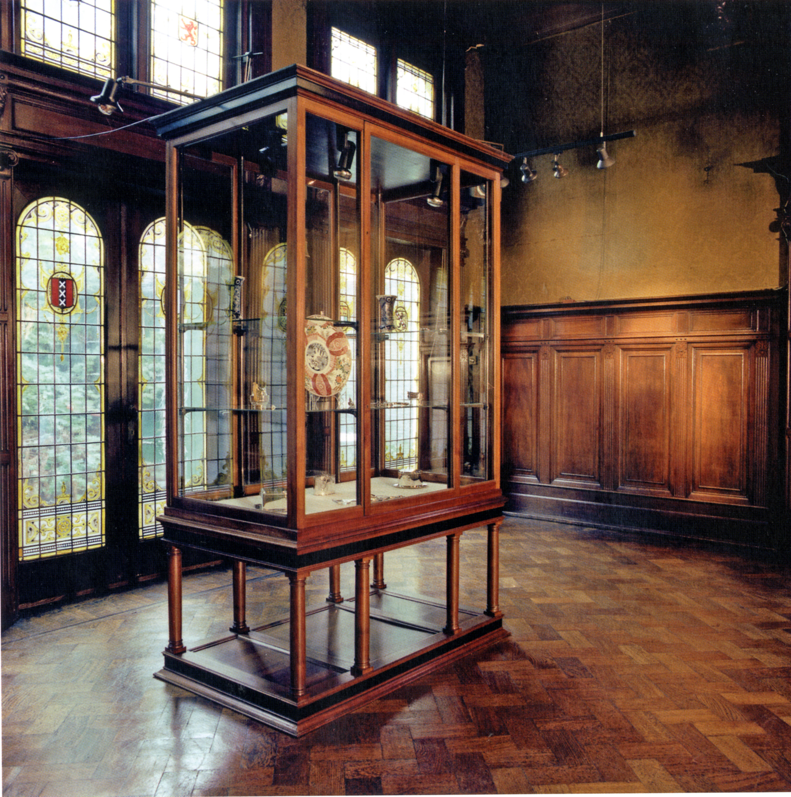 Branderszaal Lange Haven 97 Schiedam